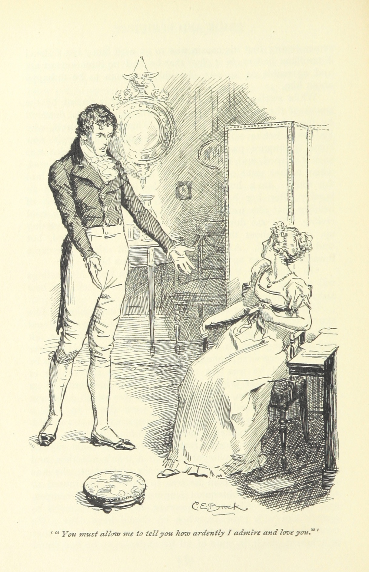 Illustration de C. E. Brock pour Pride and Prejudice (Edition MacMillan & C°, ch. 34) Déclaration de Darcy à Hunsford